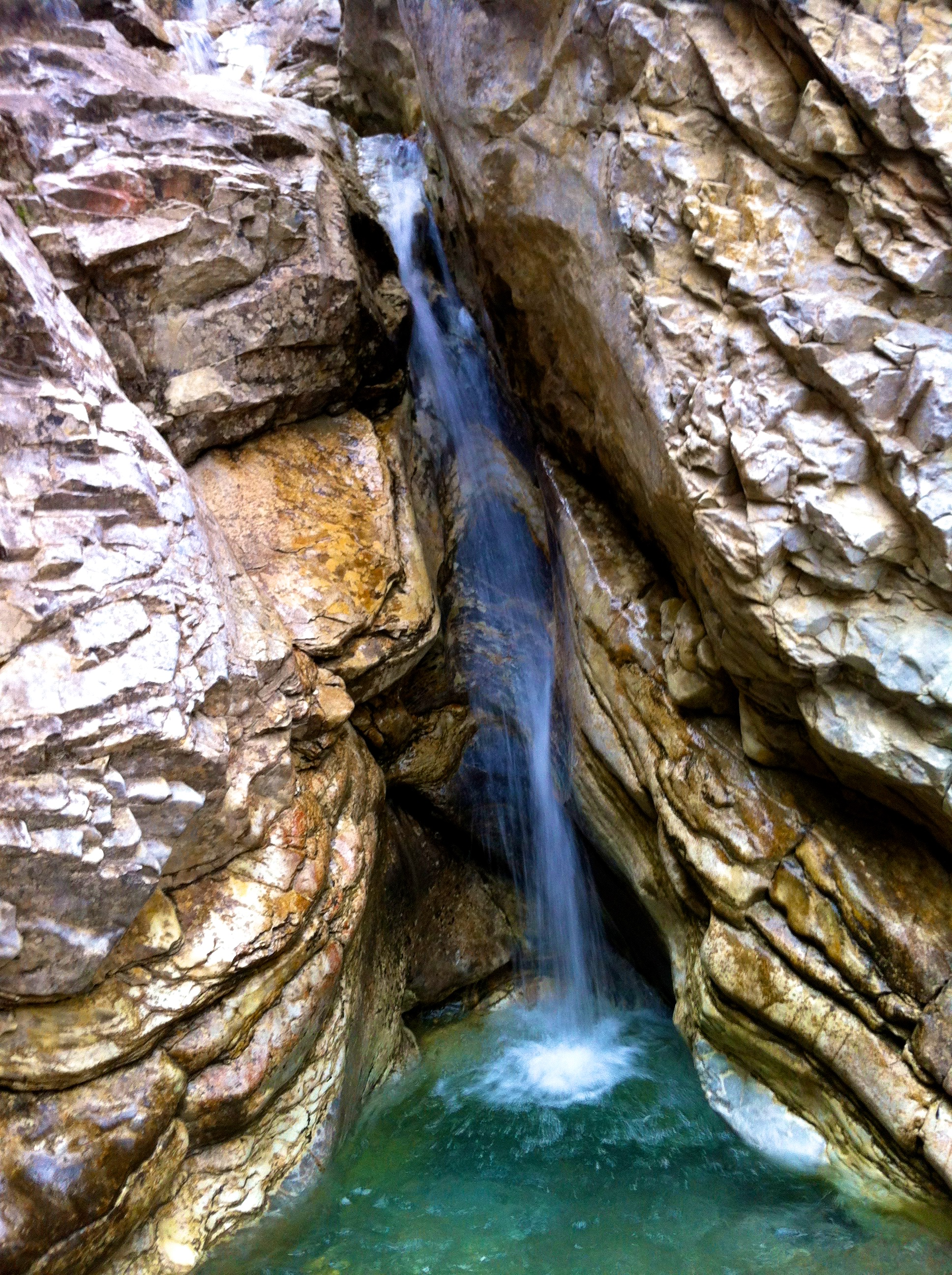 cascade traversant des couches de dolomie, de calcaire cristallin (marbre) et de prasinite dans le massif du Mont-Cenis